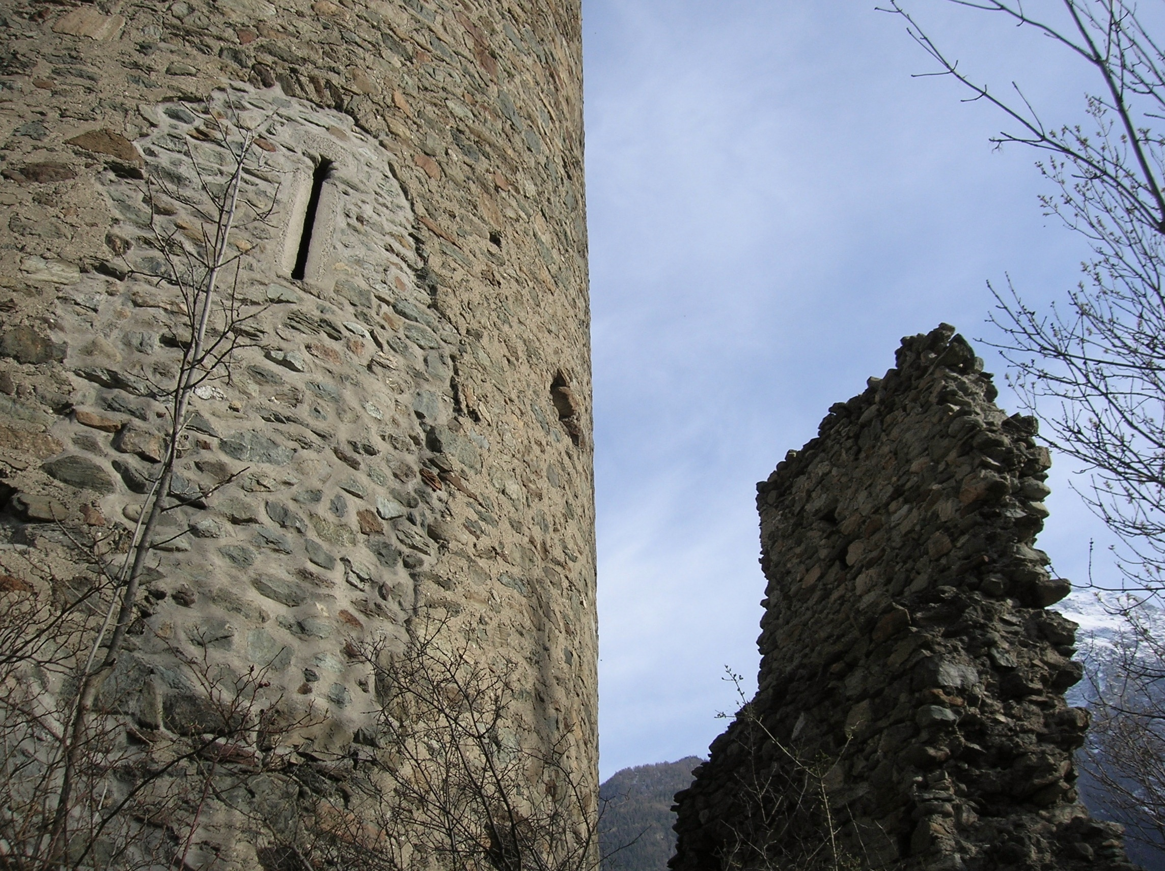 Dettaglio di feritoria della torre e rudere di muro. Castello di Brissogne, Brissogne, Valle d'Aosta, Italia.